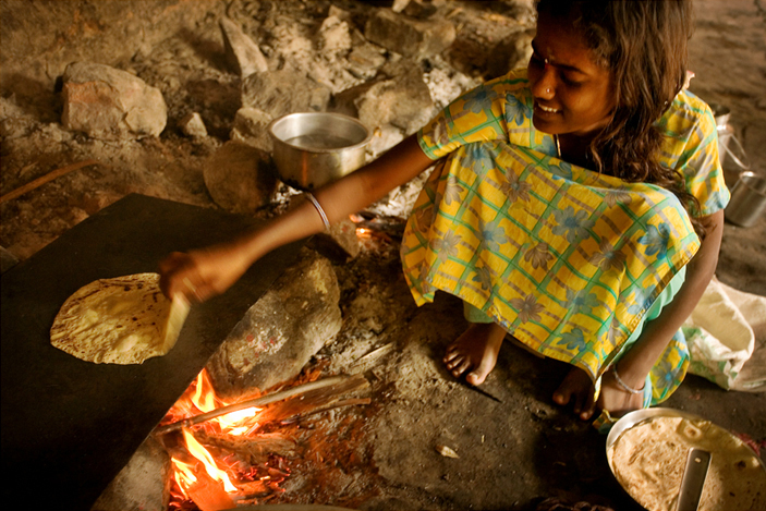 A pilgrim girl in Mahakutta, India baking chapati bread in a temple.